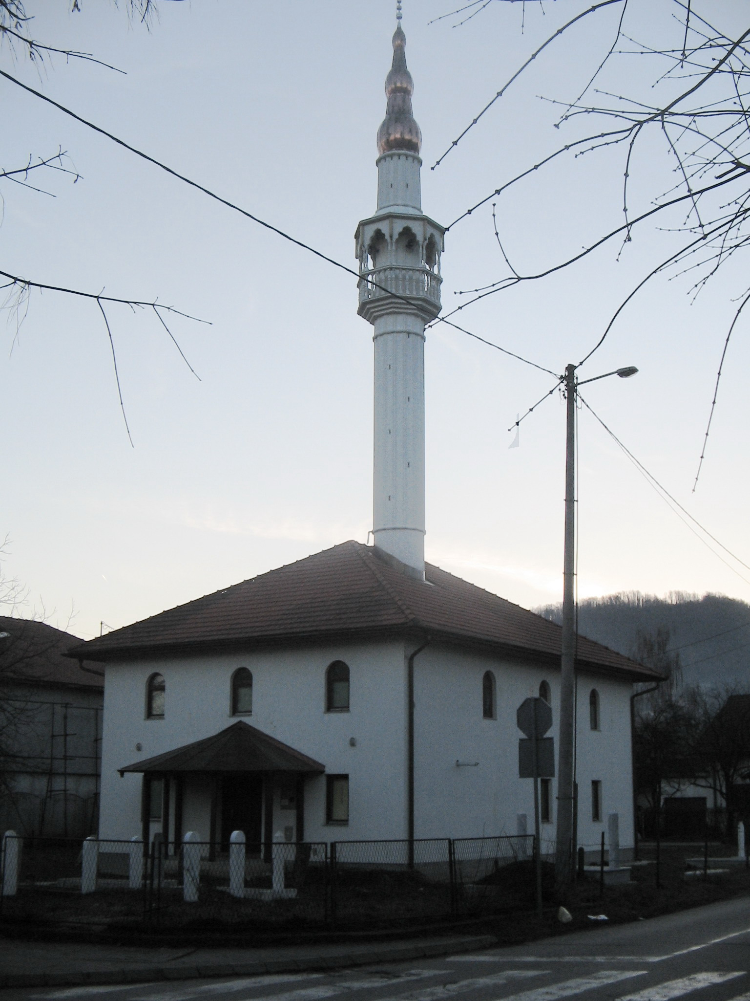 Хаџи Салихија или Ступничка џамија у Бањој Луци.